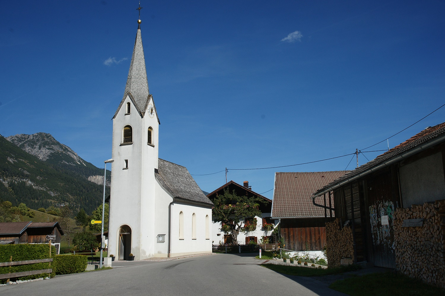 Ortskapelle hl. Josef